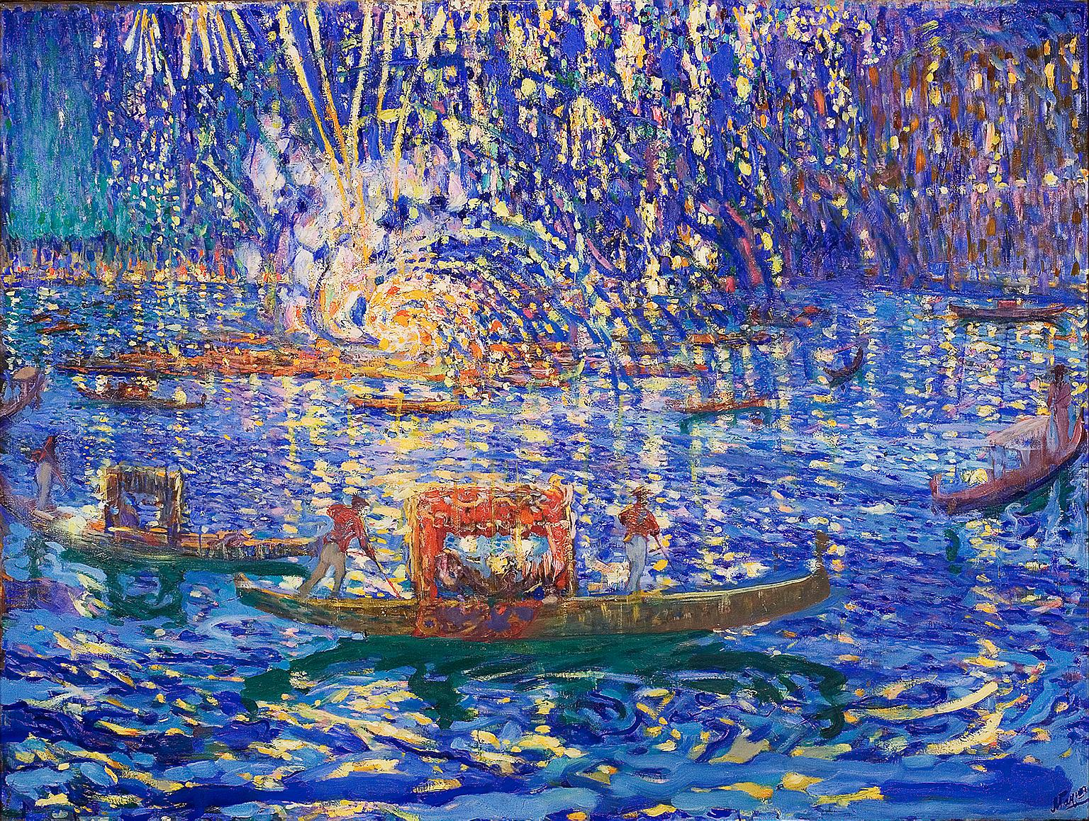 Гауш А.Ф. "Фейерверк", ок.1910. Работа находится в собрании Художественного музея Мальмё.